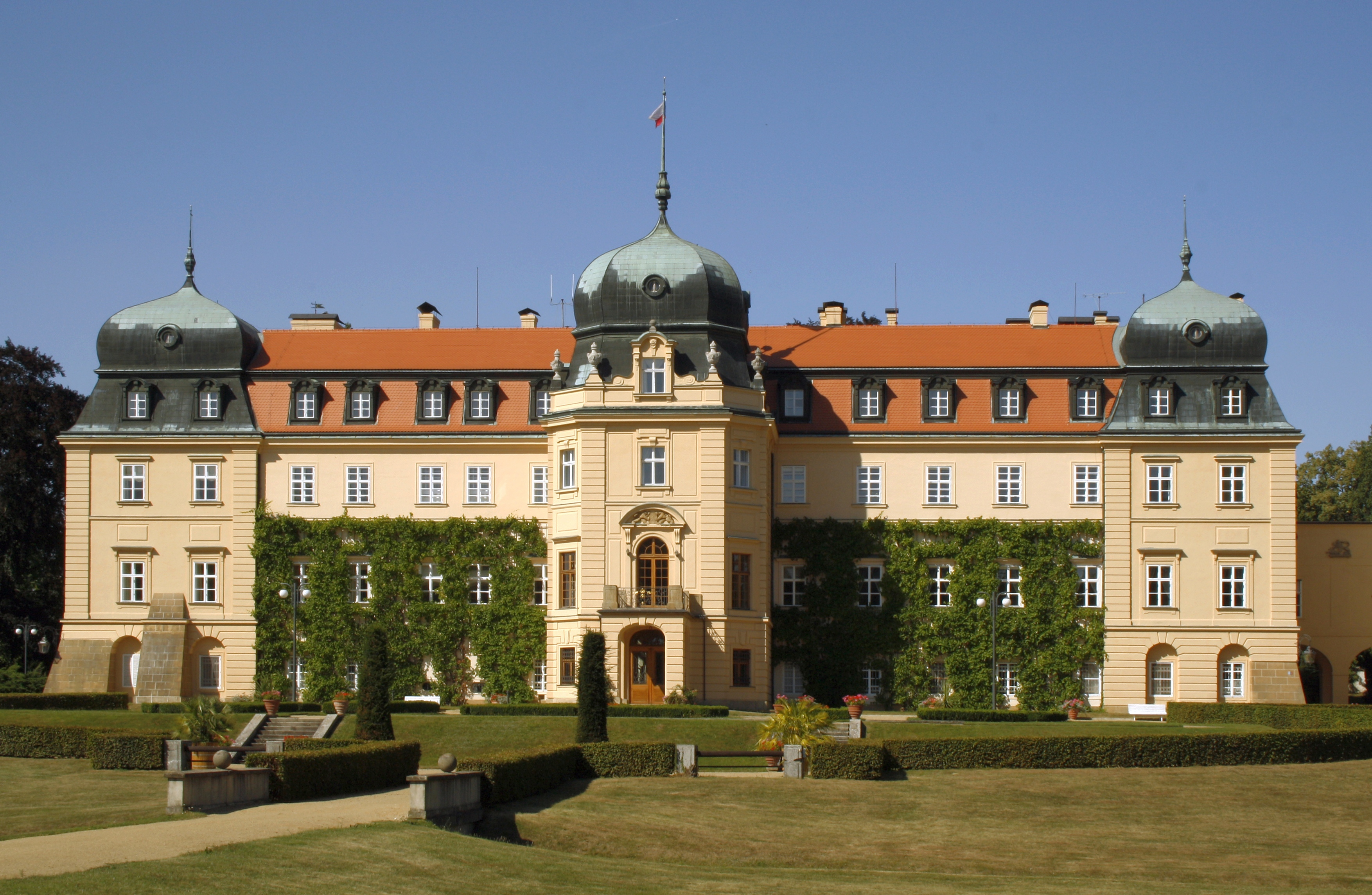 Zámek Lány, Lány 2, Lány (okres Kladno).